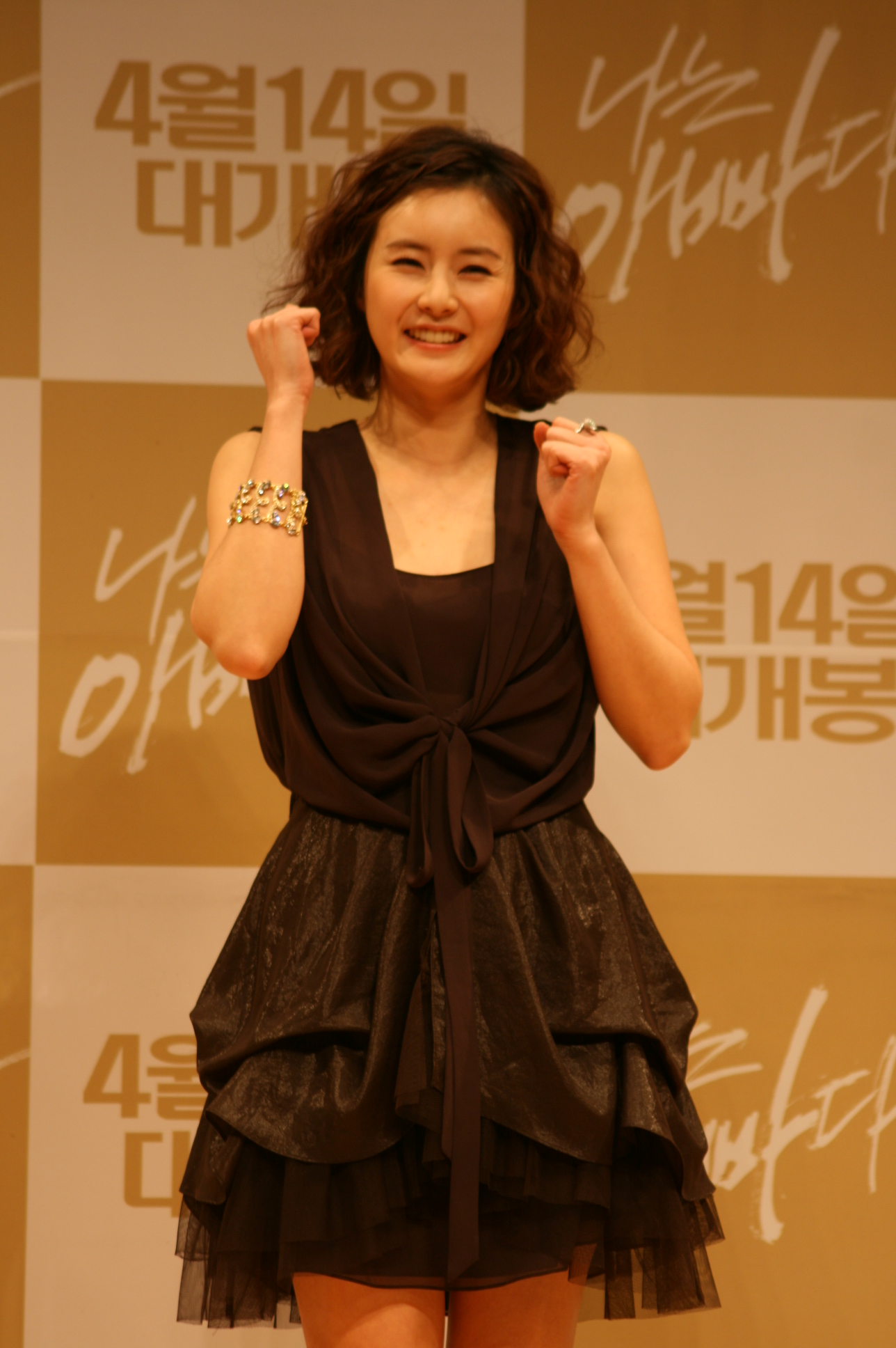 나는 아빠다 언론시사회